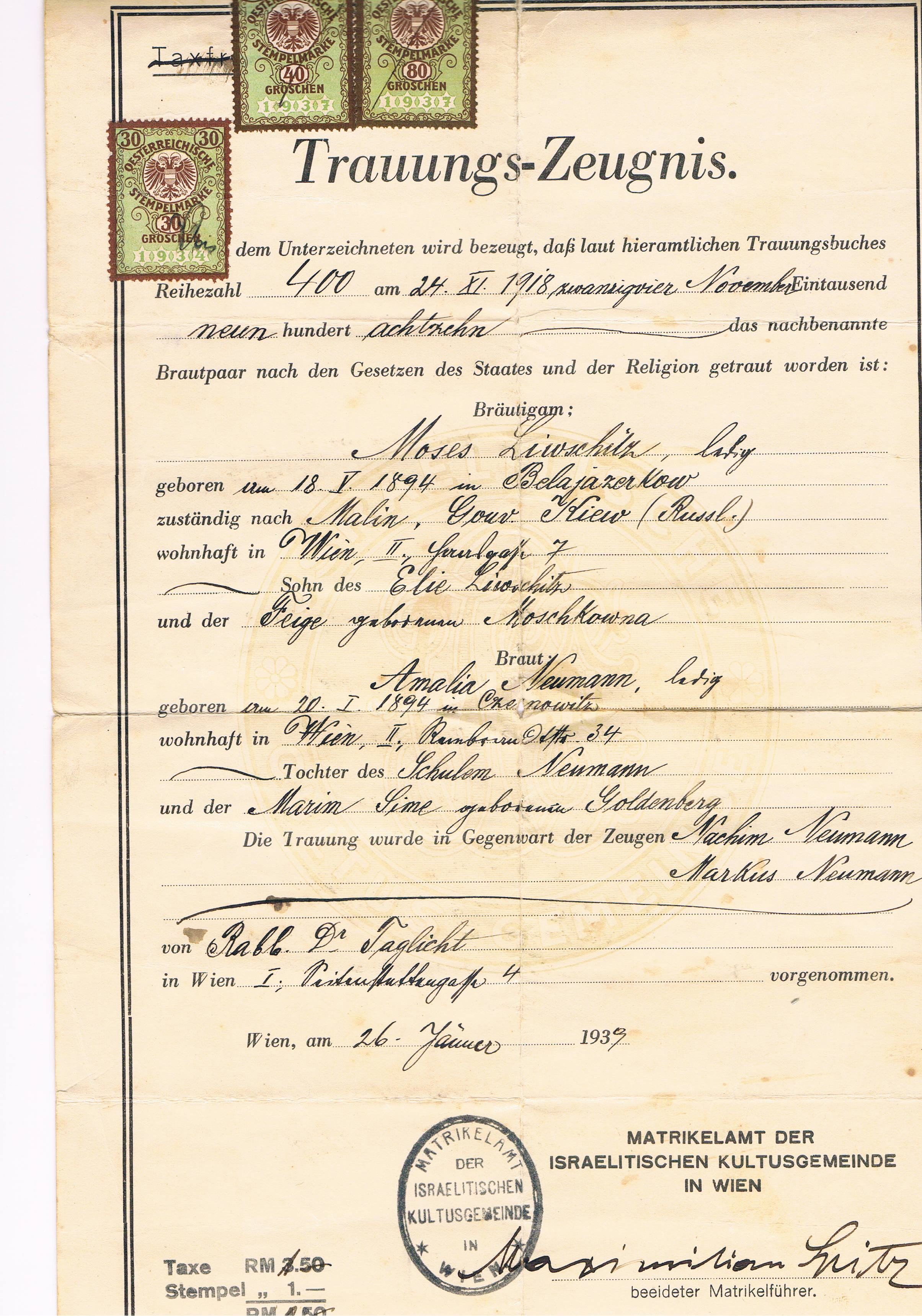 Beglaubigte Abschrift (1939) des Trauscheins (1918) von Mosche Liwschitz und Amalia Neumann